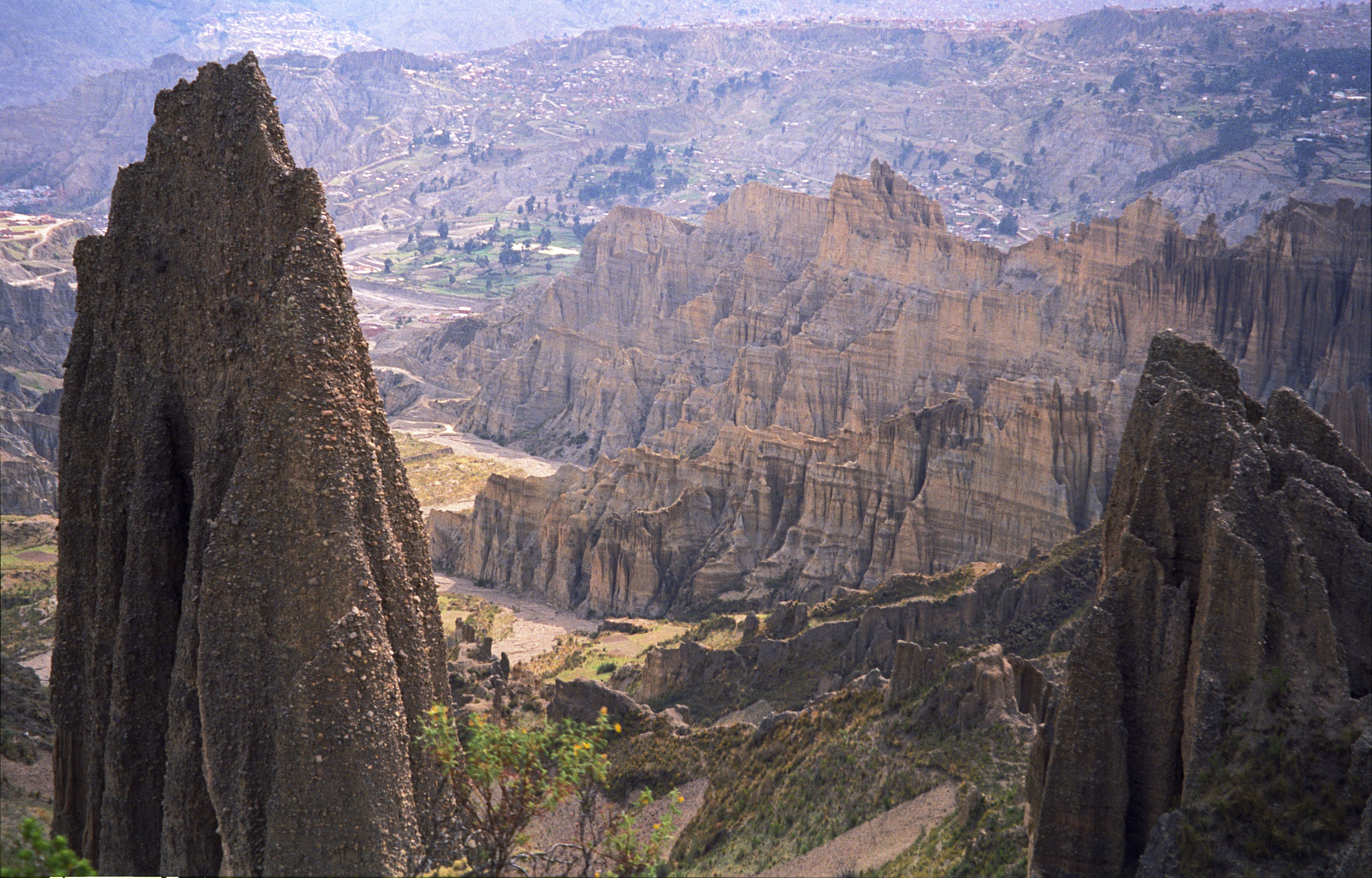 Photographer: Arnd Zschocke